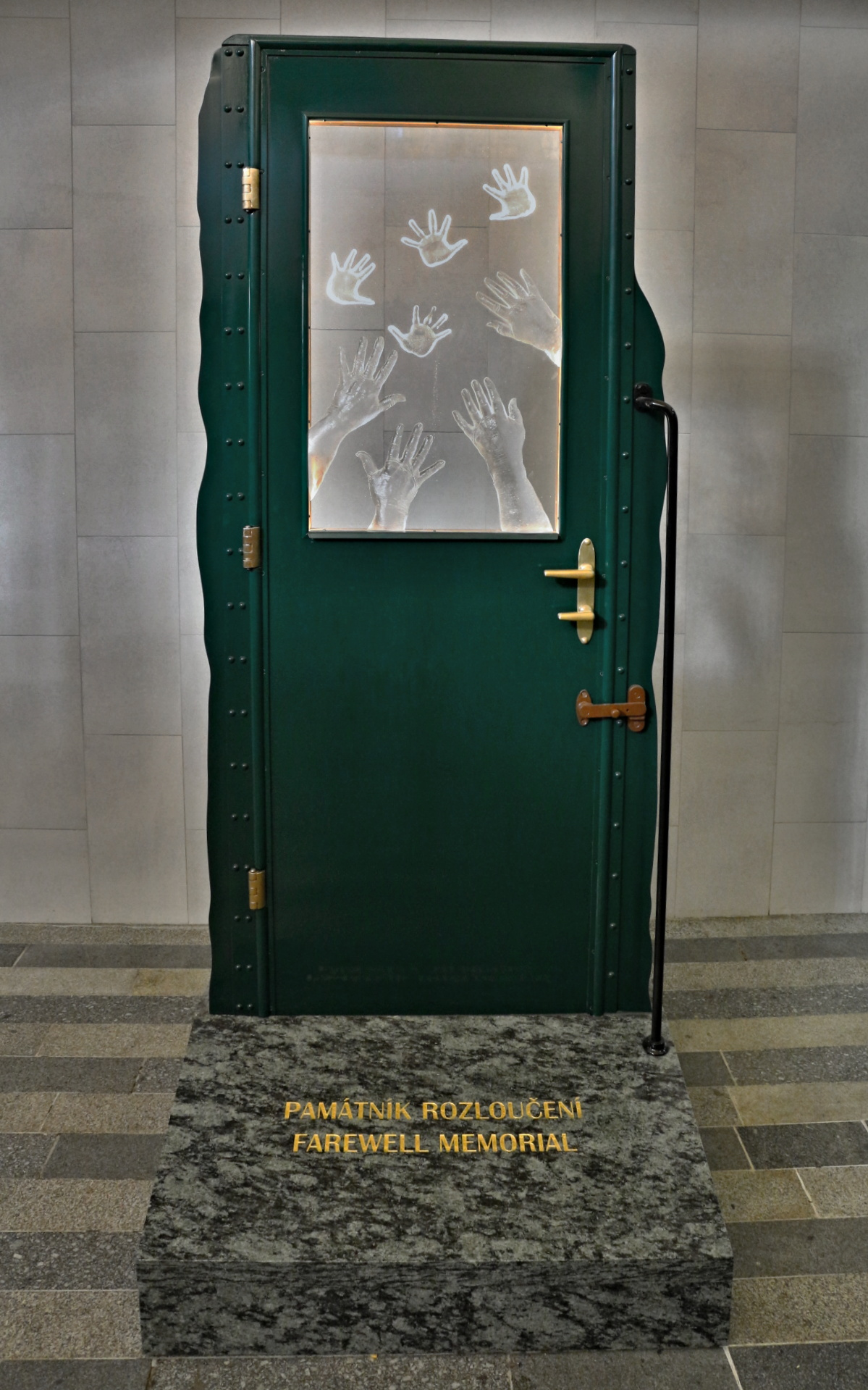 Památník rozloučení na Hlavním nádraží